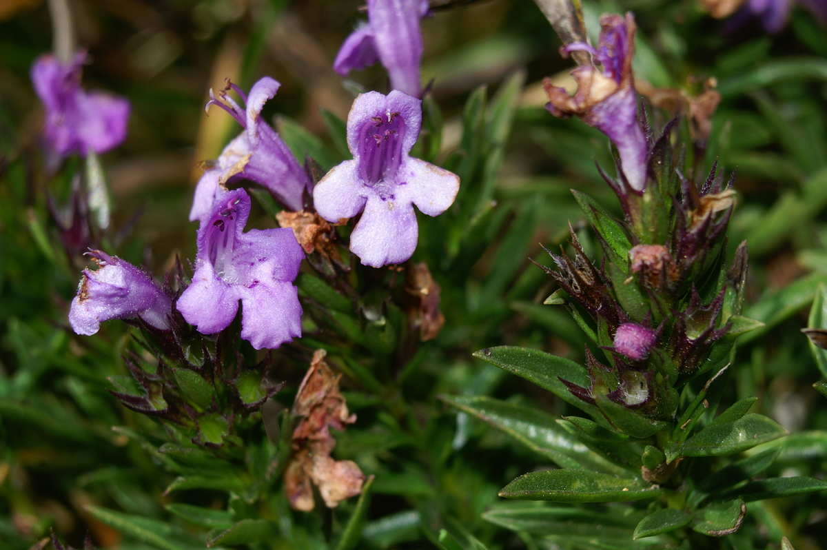 Pritlikavi šetraj na Nanosu.